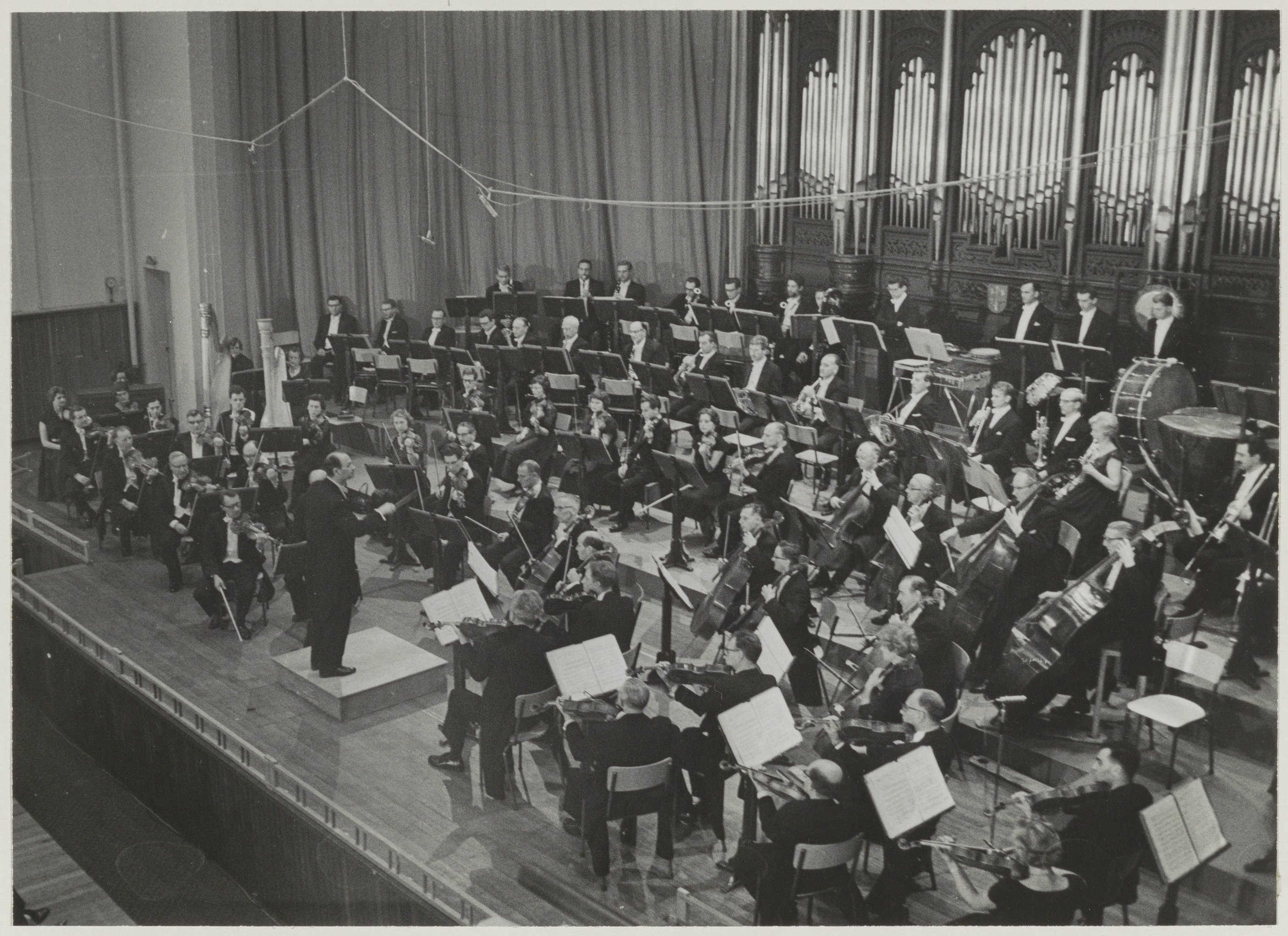 CollectieCollectie Fotoburo de BoerInventarisnummerNL-HlmNHA_54016029NL-HlmNHA_1478_420kBeschrijvingUitvoering van het Noordhollands Philharmonisch Orkest o.l.v. Henri Arends in het Concertgebouw.FotonummerNL-HlmNHA_1478_2478DocumenttypeHistorieprenten, tekeningen en foto'sVervaardigerBoer, Cees de (1918-1985) Soort vervaardigerFotograaf PersonenArends, H. Functies personendirigent LandNederland ProvincieNoord-Holland GemeenteHaarlem PlaatsHaarlem StraatLange Begijnestraat Begindatum1964Einddatum1966TechniekFoto Trefwoordenkunst en cultuur